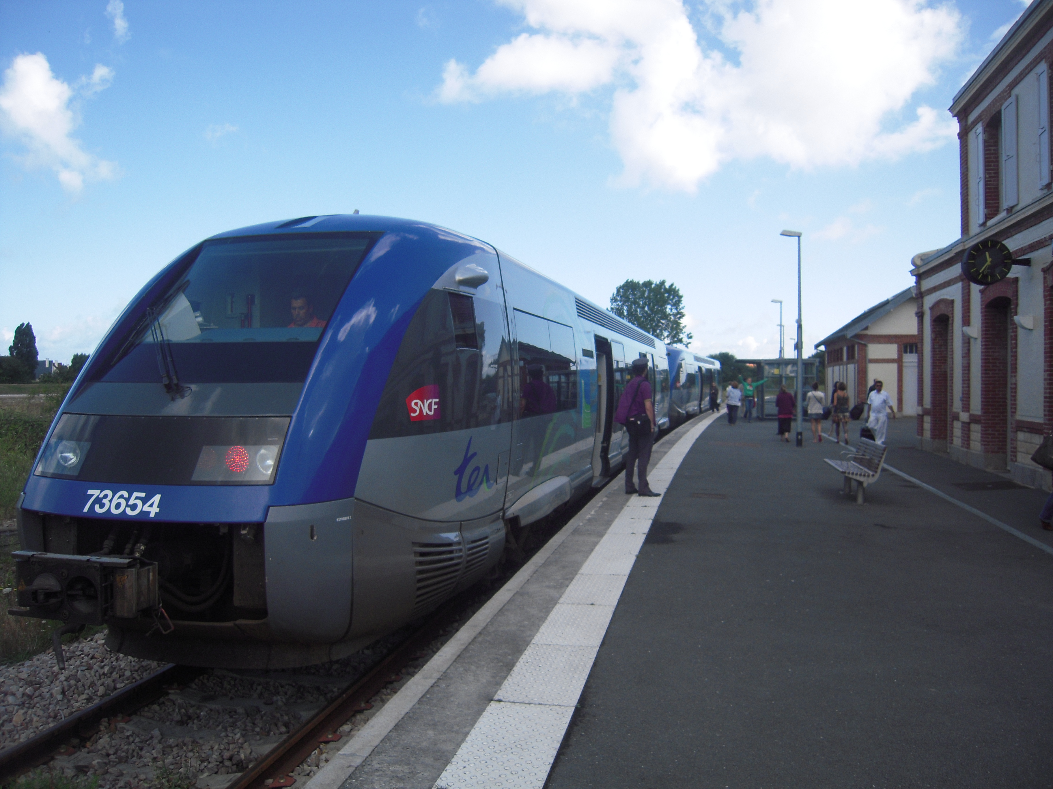 La gare fut desservie, pendant des décennies, par des trains directs Paris-St-Lazare-Dives-Cabourg en saison, et jusque dans les années 1990, par les prestigieux turbotrains chaque fin de semaine et tous les jours en été.